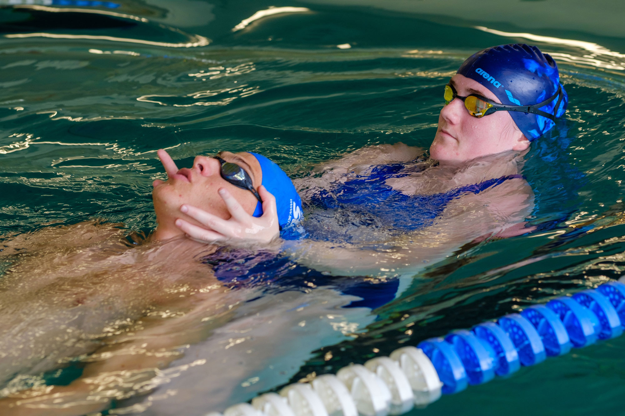 Zwei Schwimmlehrer üben das Schleppen einer Person im Wasser. Im Bild kommt der der Kopf-Schleppgriff zum Einsatz. Dabei liegt der Ertrinkende sehr flach im Wasser, wodurch das Schleppen erleichtert.